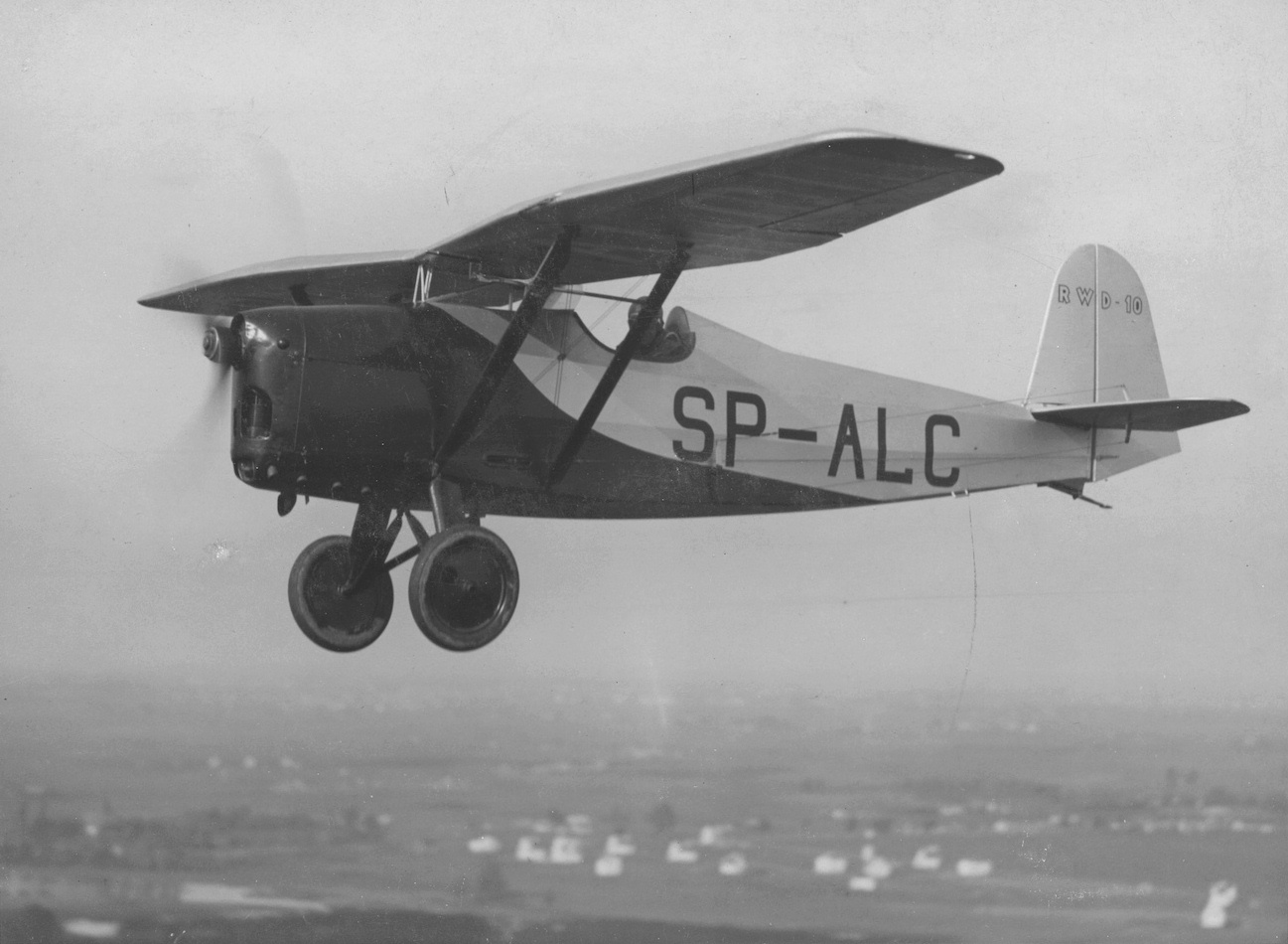 Pierwszy prototyp samolotu RWD 10 pilotowany przez Kazimierza Chorzewskiego.